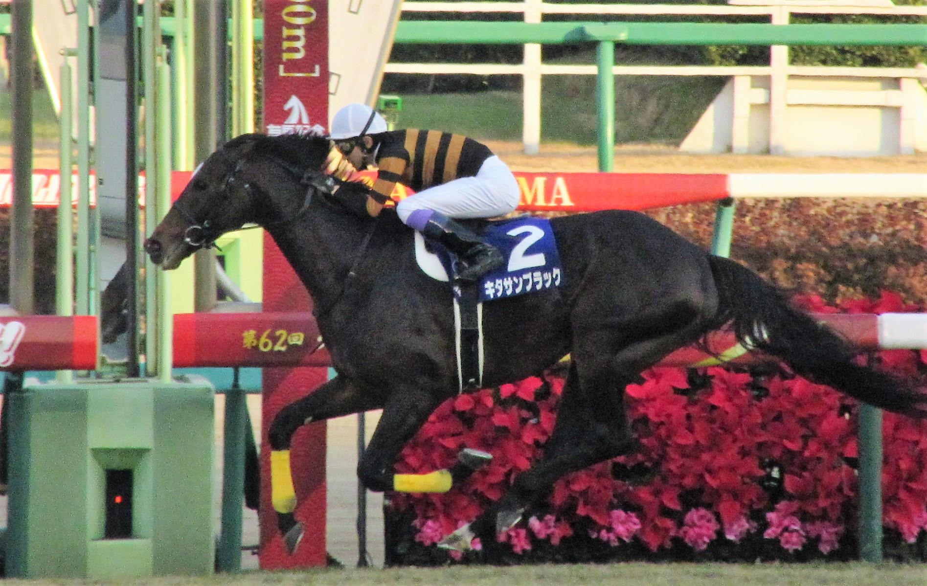 第62回有馬記念を勝ったキタサンブラック